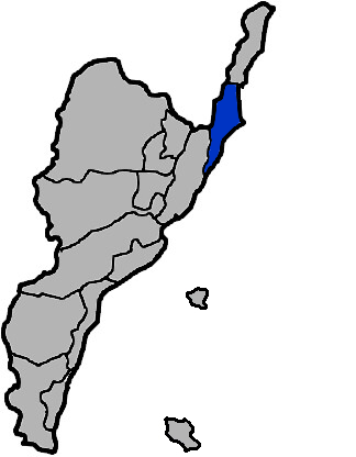 中華民國臺灣省臺東市成功鎮。KJ (talk)繪製。